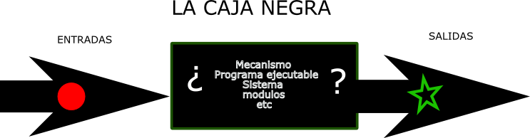 Modelo esquemático de teoría científica fenomenológica